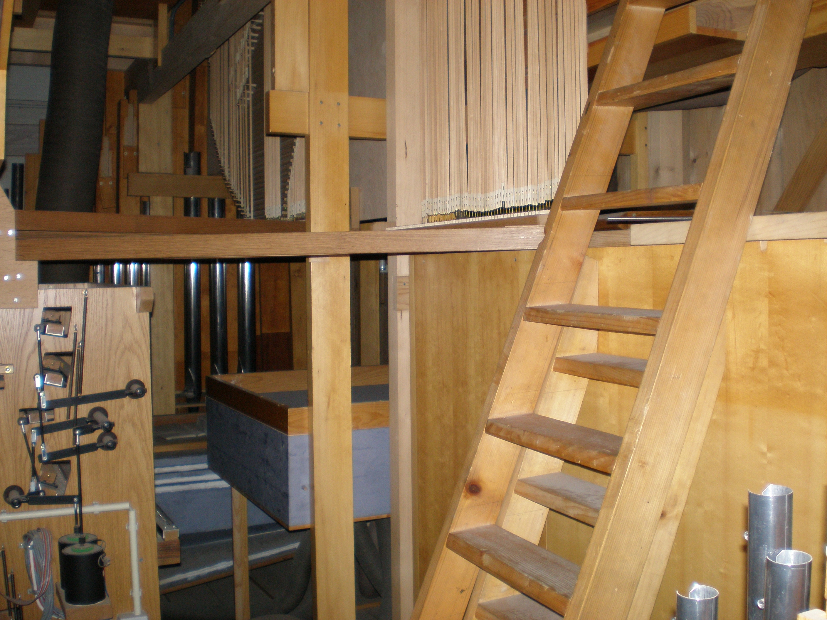 Unutrašnjost orgulja varaždinske katedrale